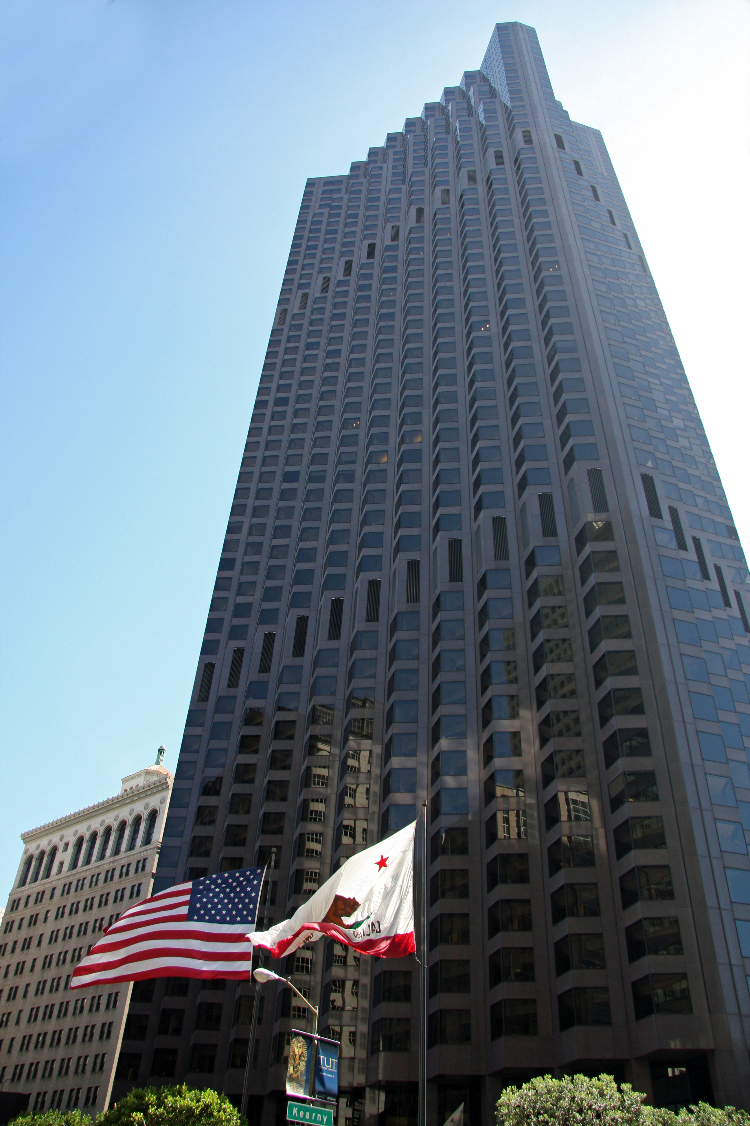 San Francisco 53